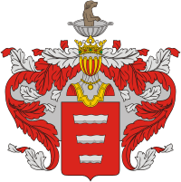 Герб из Общего гербовника дворянских родов Российской империи